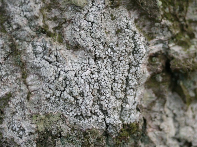 Bittere Porenflechte Pertusaria amara, Hüttelmoor östlich von rostock